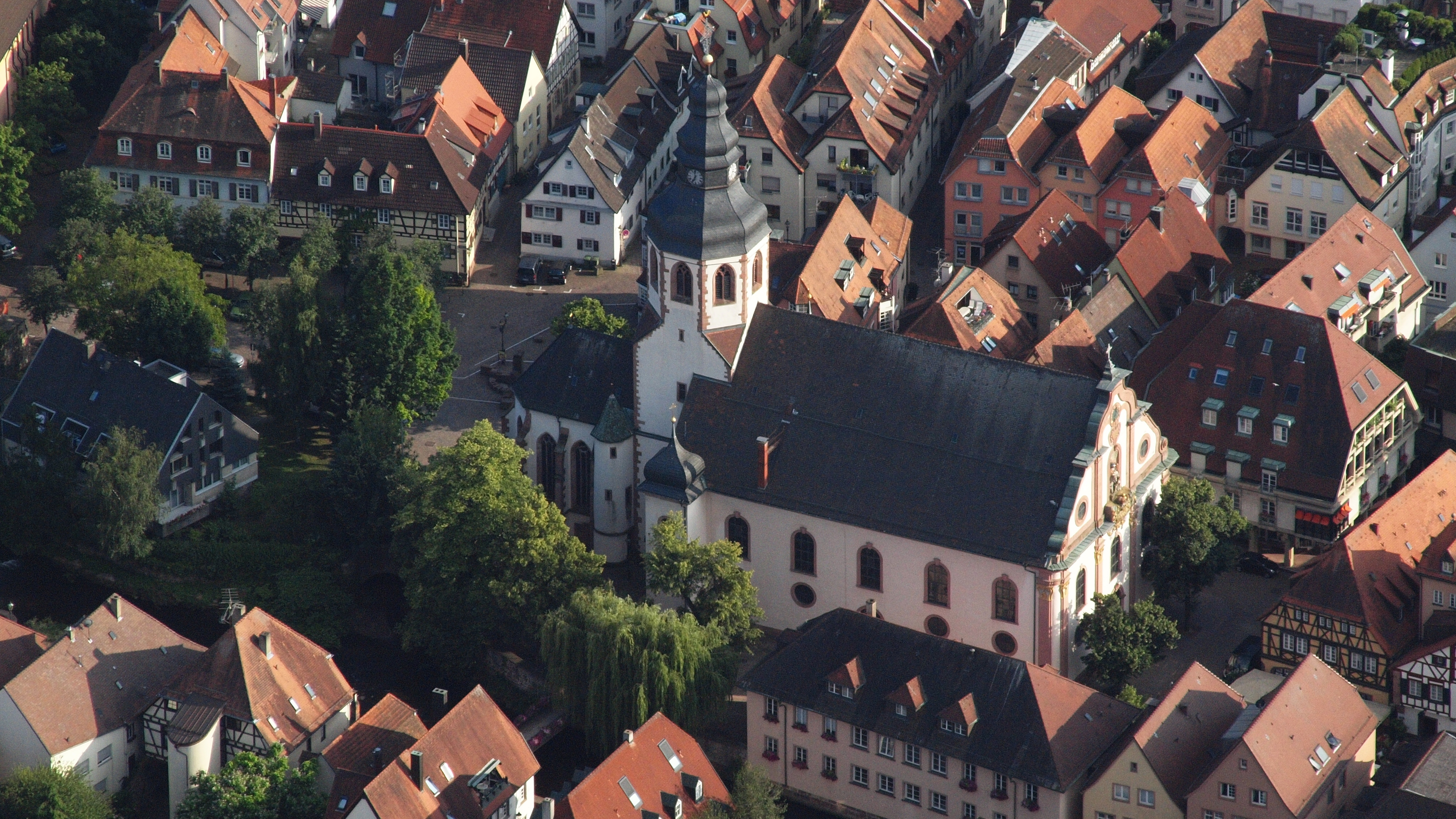 Martinskirche, Ettlingen: Luftaufnahme